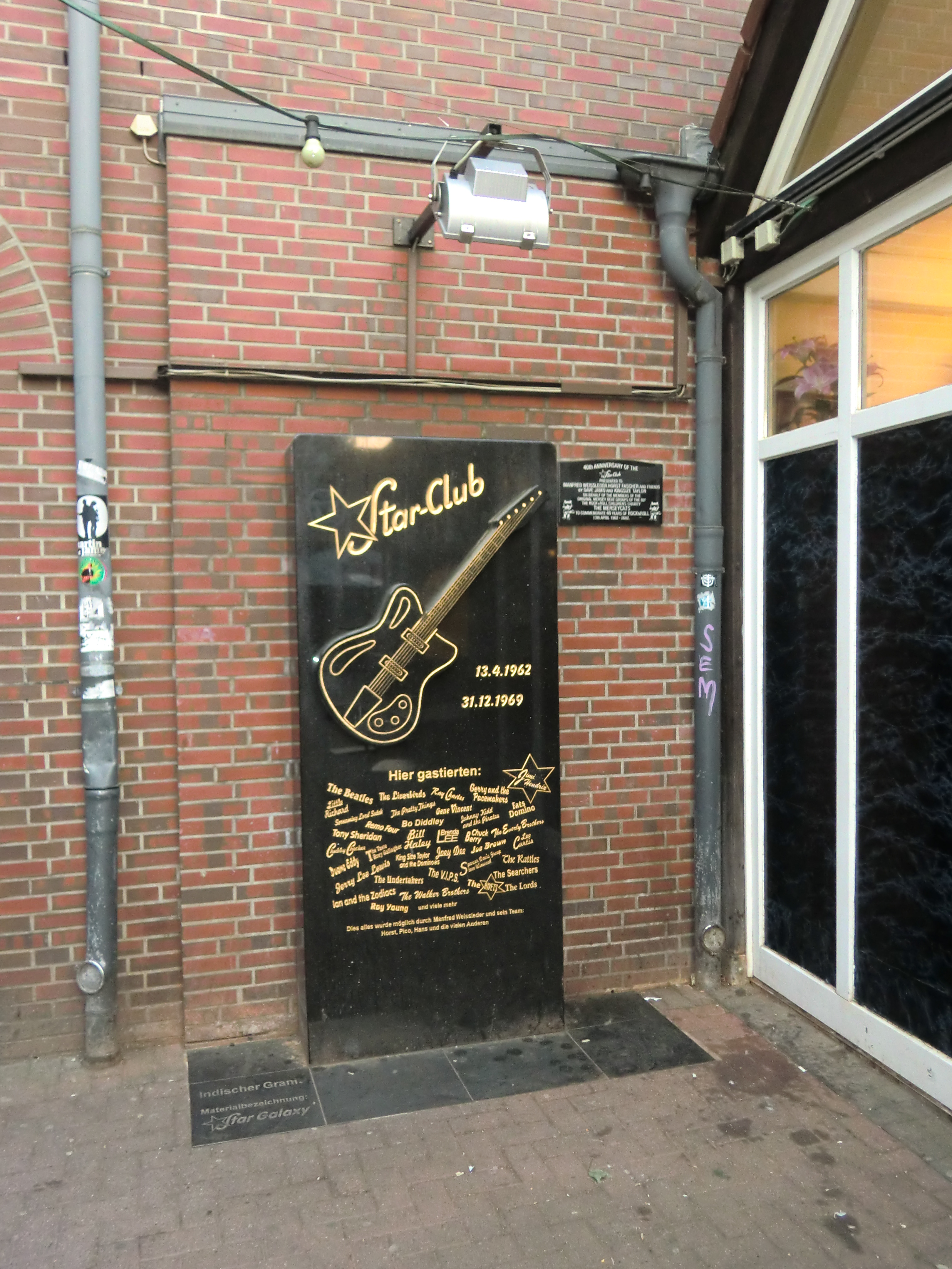 Gedenktafel Grabstein Star Club, Hamburg Große Freiheit 39; "Star-Club 13.04.1962 31.12.1969 Hier gastierten: The Beatles The Liverbirds Ray Charles Gerry and the Pacemakers Jimi Hendrix Little Richard Screaming Lord Sutch The Pretty Things Gene Vincent Fats Domino Remo Four Bo Diddley Johnny Kidd and the Pirates Tony Sheridan Bill Haley Brenda Lee Chuck Berry The Everly Brothers Duane Eddy The Taste Rory Gallagher King Size Taylor and the Dominoes Joey Dee Joe Brown Lee Curtis Jerry Lee Lewis The Undertakers The V.I.P.S. Spencer Davies Group Steve Winwood The Rattles Ian and the Zodiacs The Walker Brothers The Rivets The Searchers The Lords Roy Young und viele mehr Dies alles wurde möglich durch Manfred Weissleder und sein Team: Horst, Pico, Hans und die vielen Anderen"